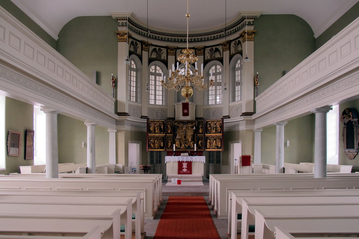 Die St.-Vitus Kirche von innen. Auch zu sehen der handgeschnitzte Altar.